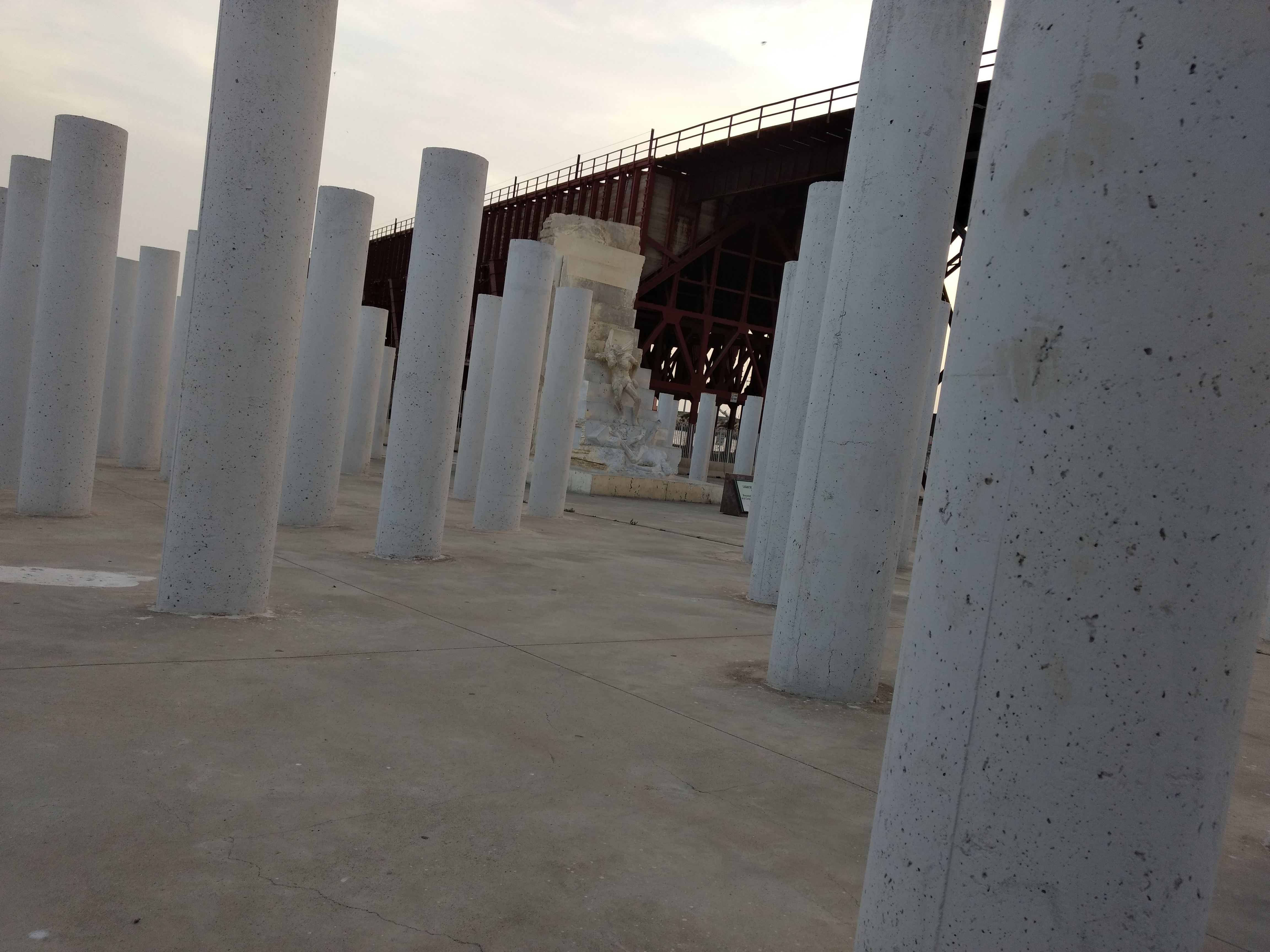 Monumento a las víctimas del campo de concentración de Mauthausen en el parque de las Almadrabillas de Almería Monumento a las víctimas del campo de concentración de Mauthausen (Almería)